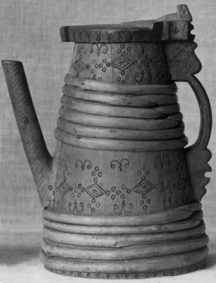 Tutekanne|Tutekanne datert 1752 fra Tinn i Telemark. Kannen har konisk korpus og er dekorert med svidd dekor. H. 27 cm. Foto Norsk Folkemuseum, NF.1912-0265.